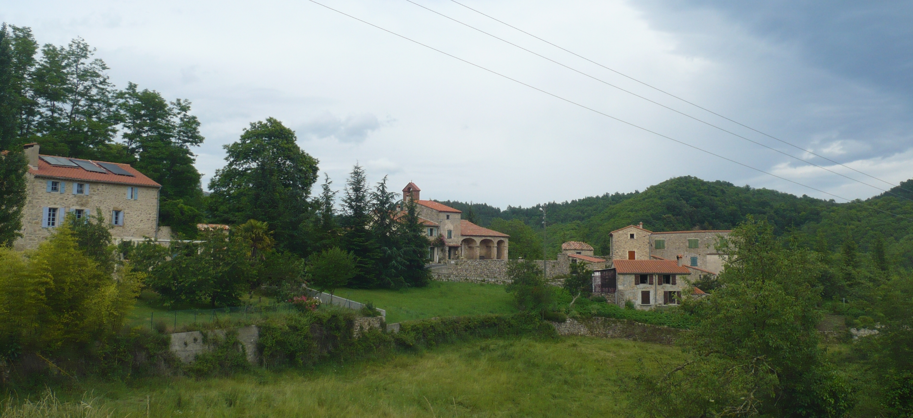 Vue générale de Villeroge